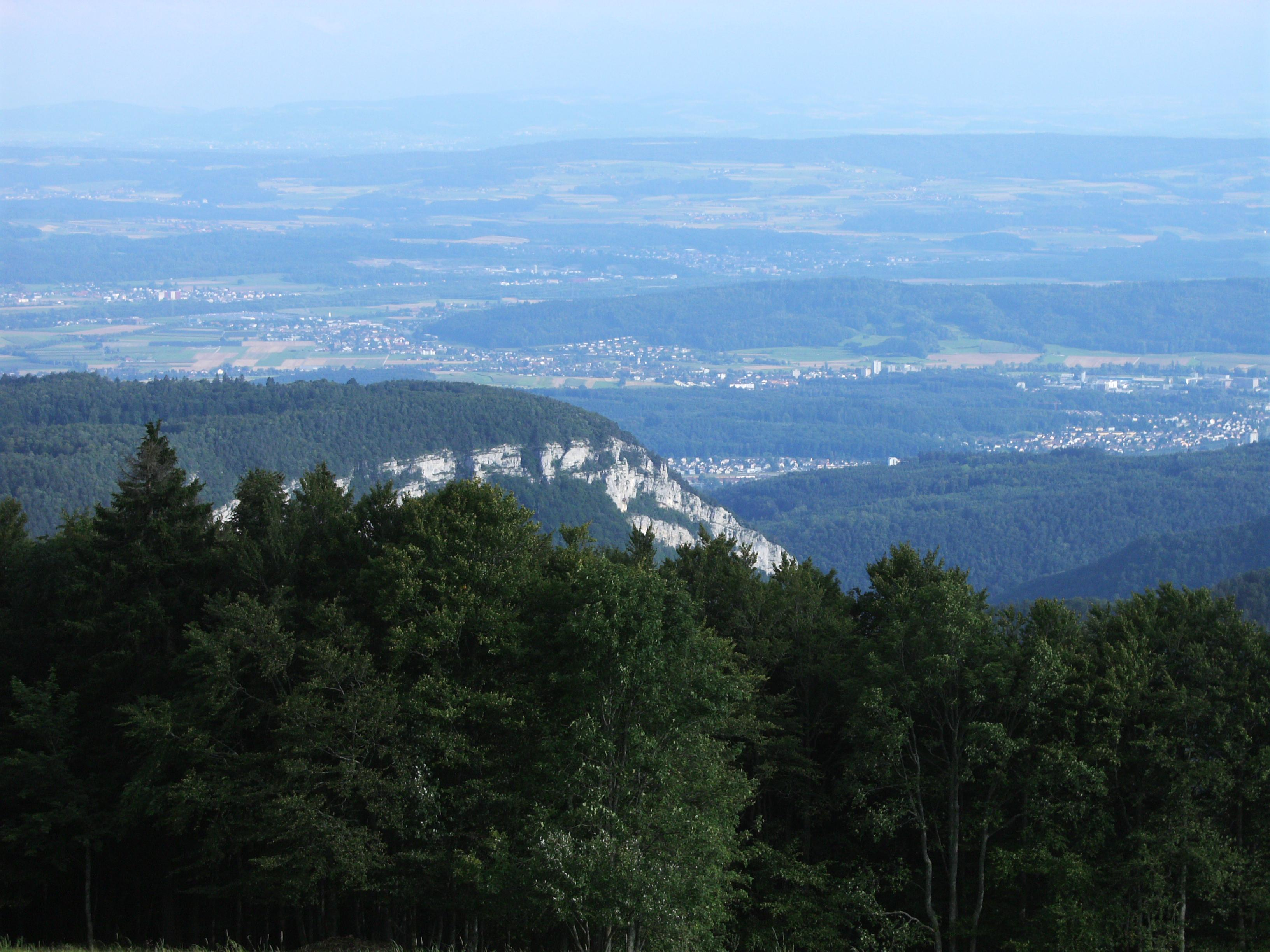 Vue du Plateau suisse, les rochers surplombent les Gorges du Taubenloch. Communes visibles : Bienne (à côté des rochers et droite de la photo), Schwadernau, Studen et Brügg (dans la plaine). Prise de la photo depuis la Métairie de Werdt, commune de La Heutte, sur le Montoz.